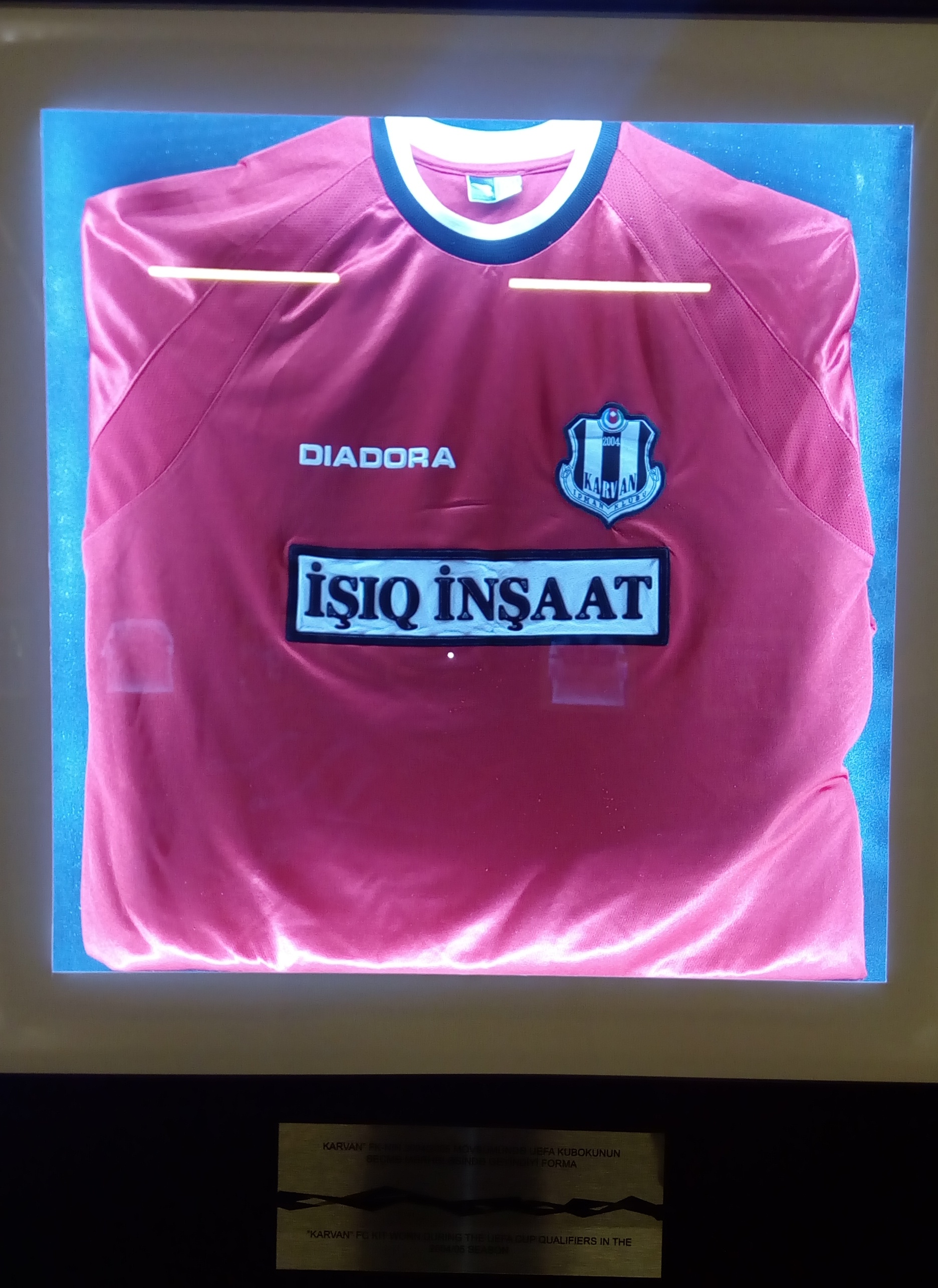 Avropa Liqası Muzeyi Bakıda